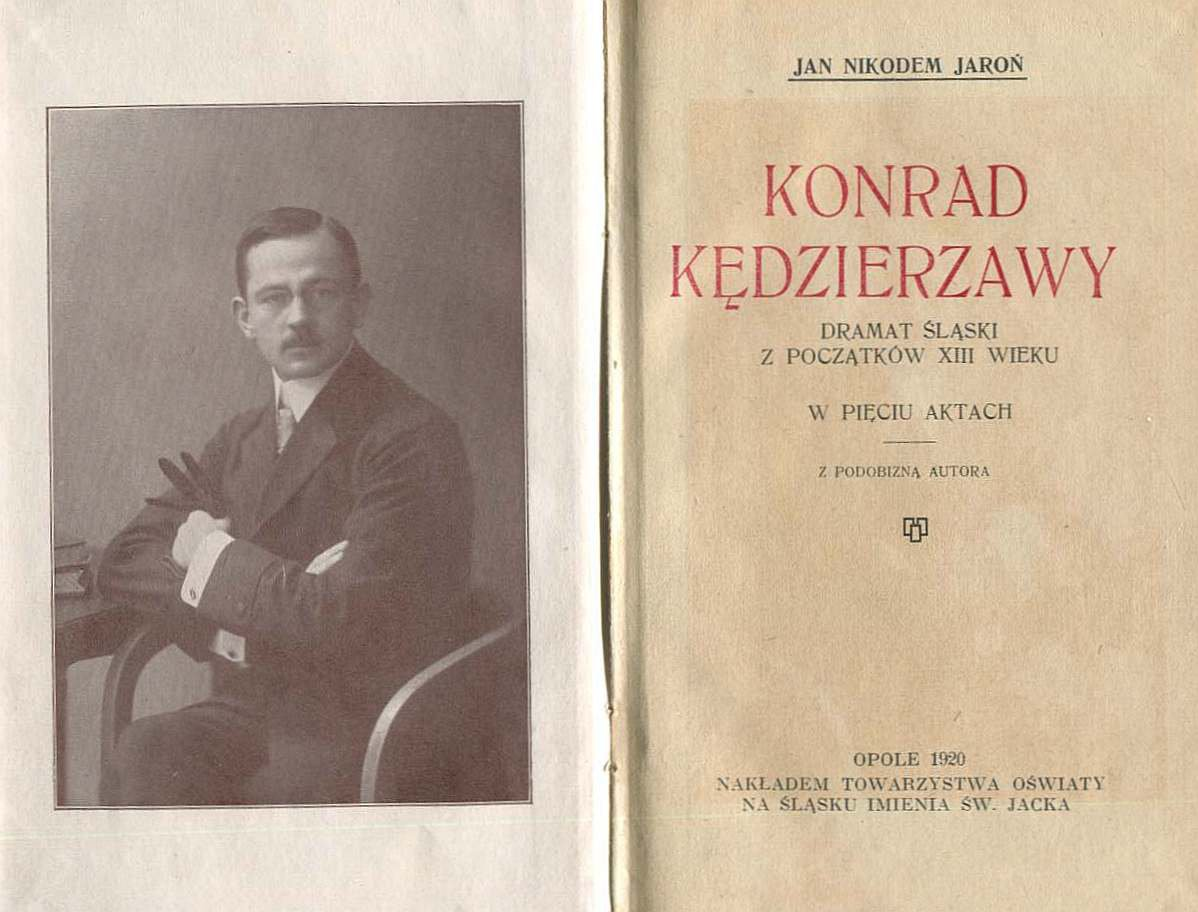 Польский поэт, драматург, участник Третьего силезского восстания.